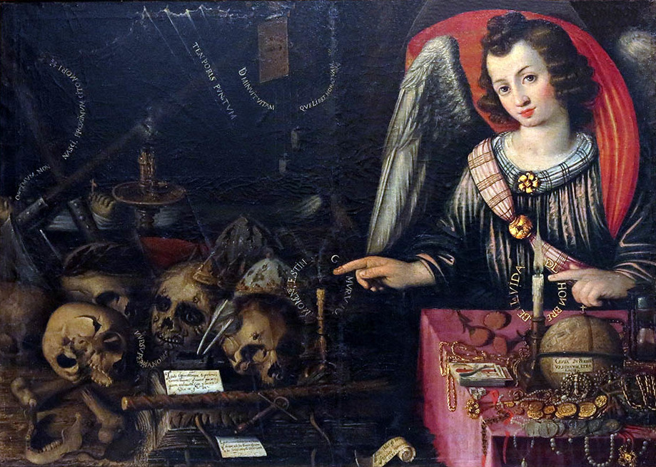 Vanitas con ángel admonitorio (1639), de Francisco Velázquez Vaca, Monasterio de San Quirce, Valladolid.